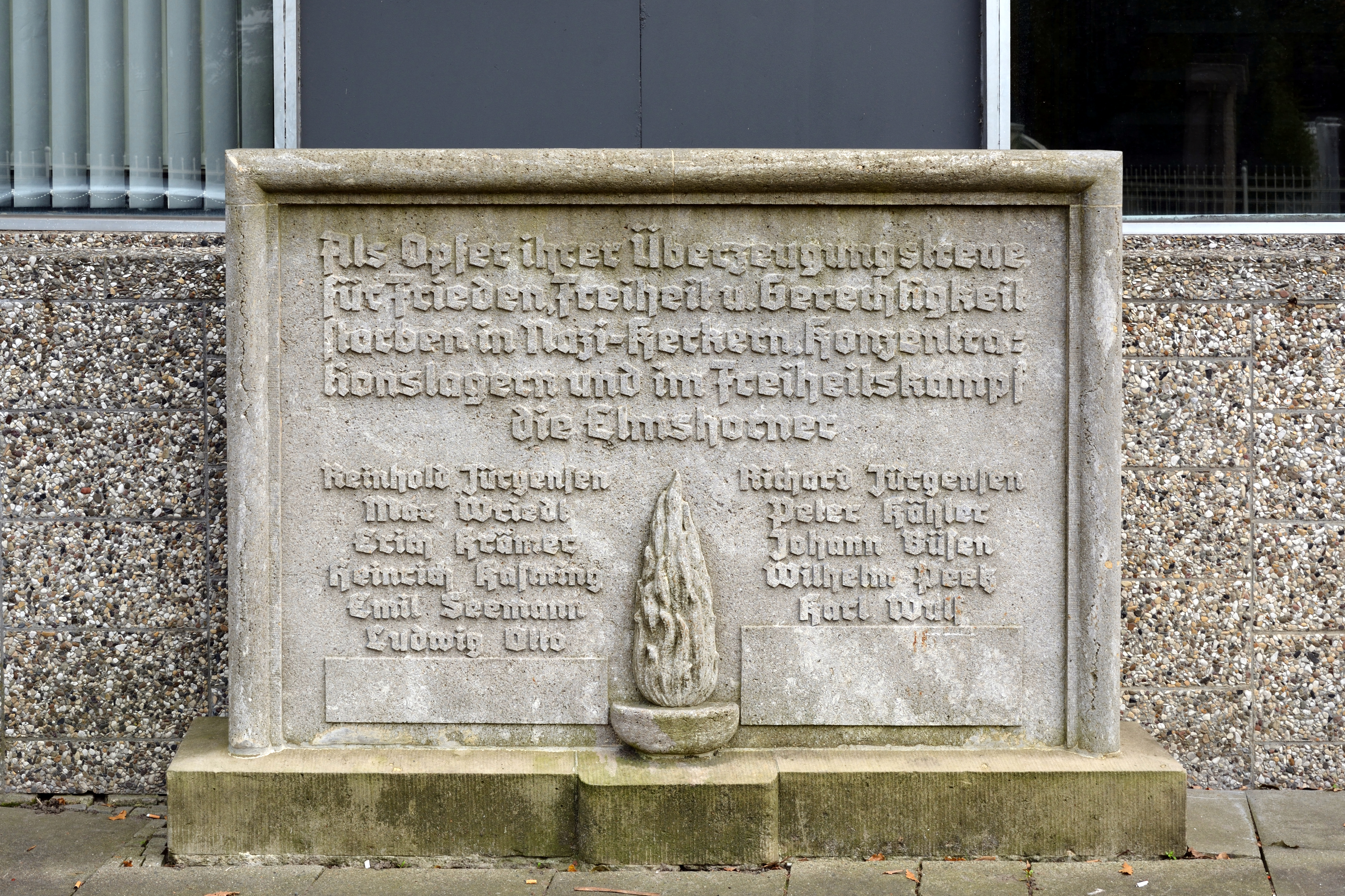 Gedenkstein und -tafel am Rathaus Elmshorn